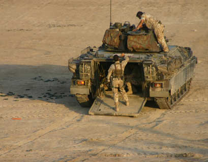 Dardo IFV visto dal retro durante la manutenzione